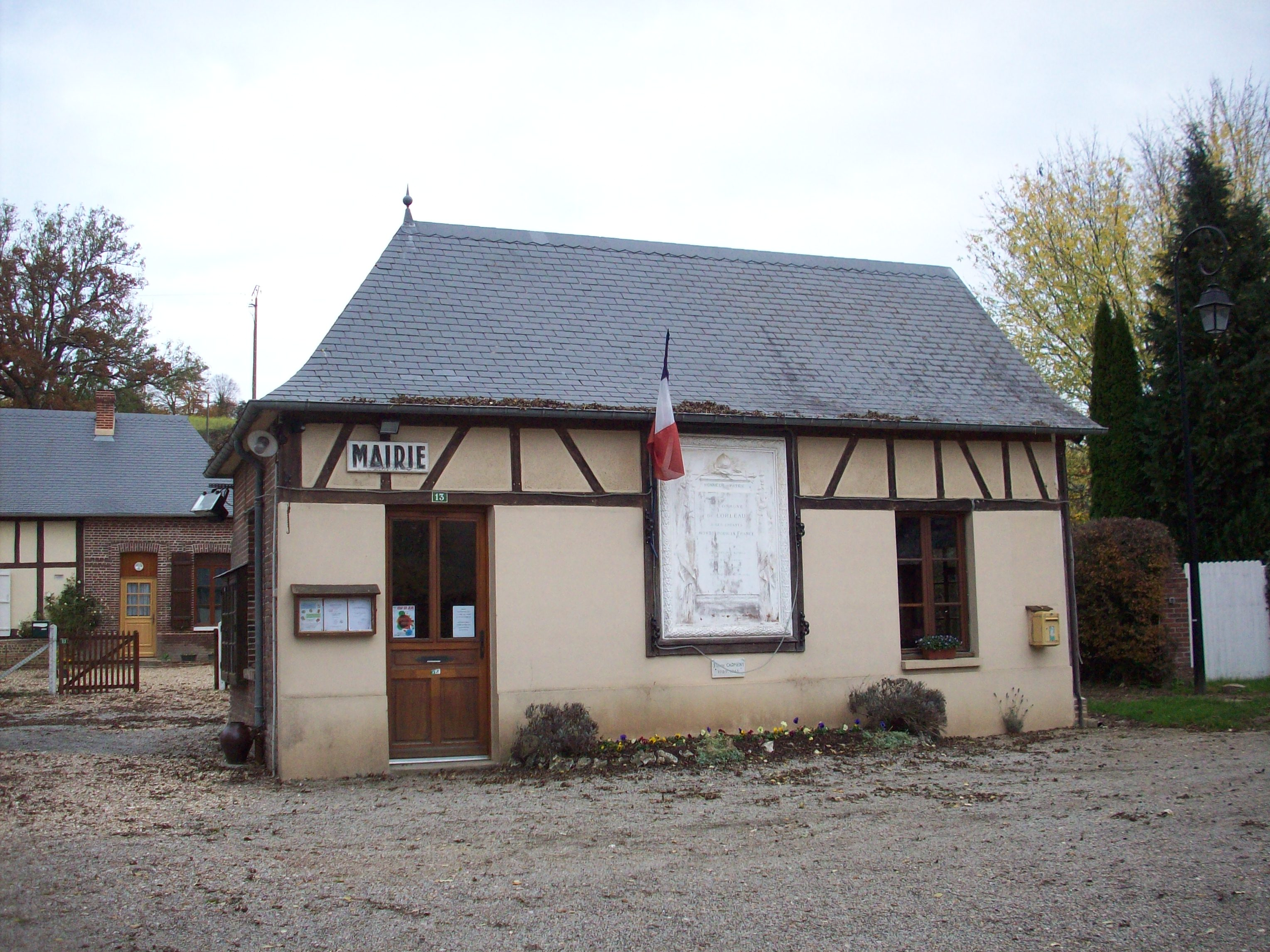 Mairie de Lorleau.